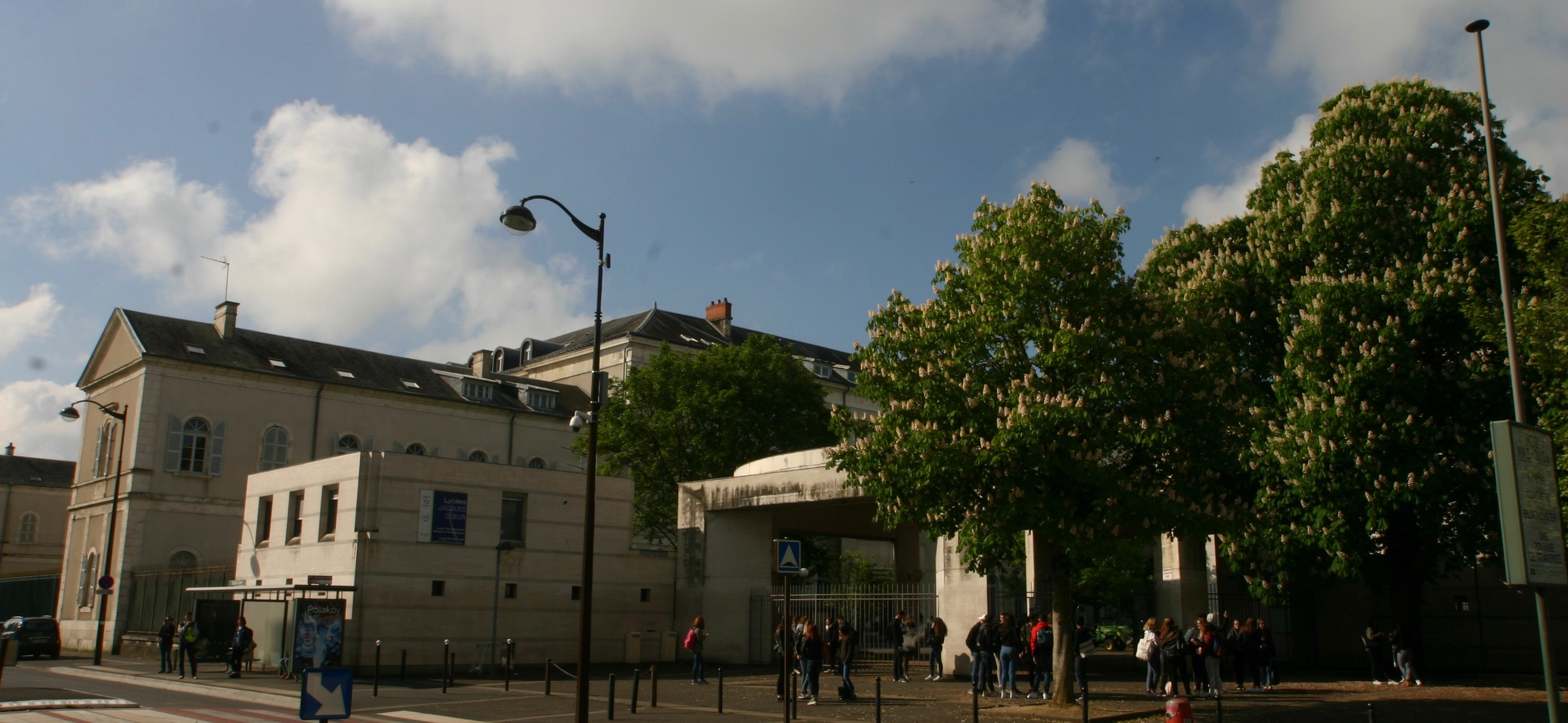 Plan D'ensemble sur L'entrée du Lycée Jacques Cœur 18000 Bourges, [France]